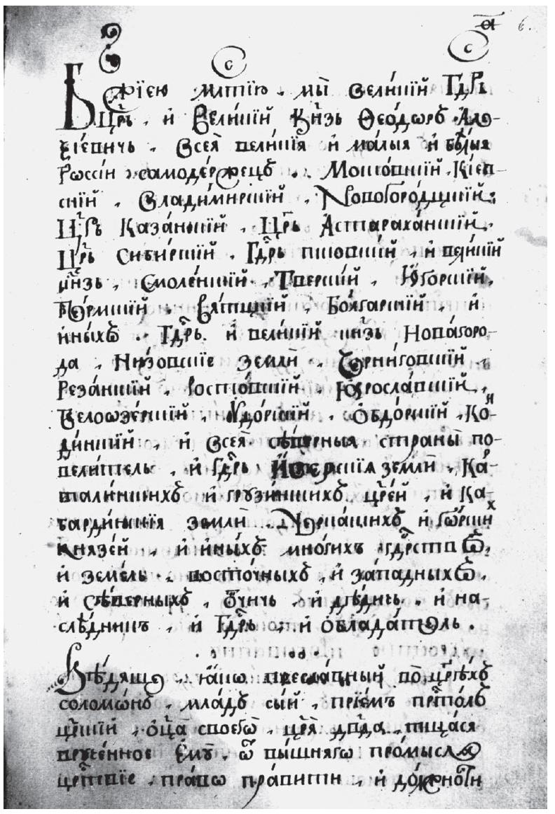 "Привилегия на Академию" или "Академическая Привилегия" на открытие Славяно-Греко-Латинской Академии. Л.6.